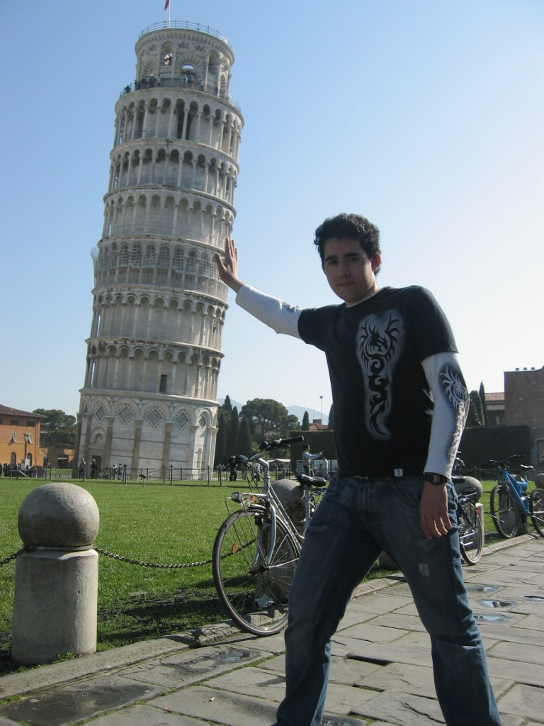 Foto mía sujetando la Torre de Pisa